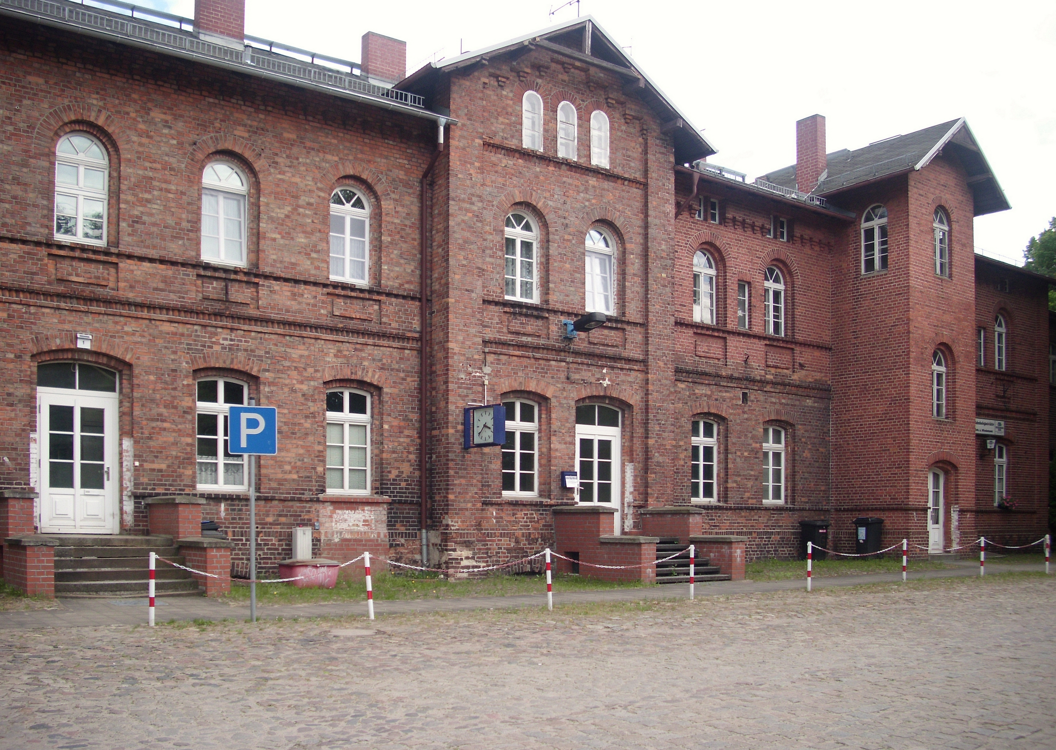 Bahnhof, Muellrose